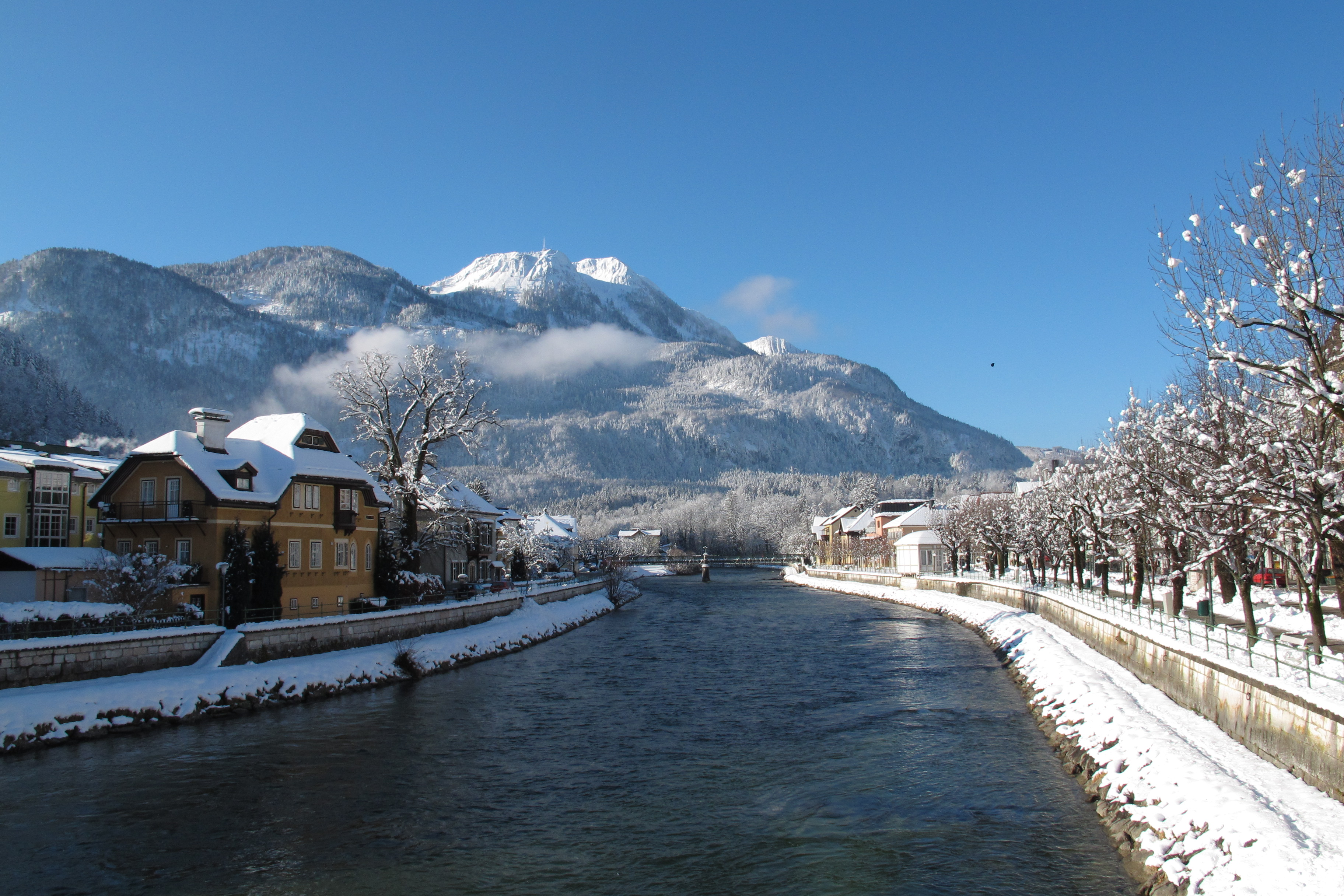 Blick von der Brücke